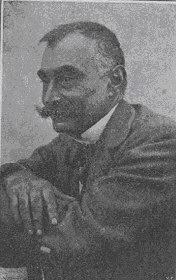 Riproduzione foto di Agatino Perrotta , collezine F. P. Frontini - 1910